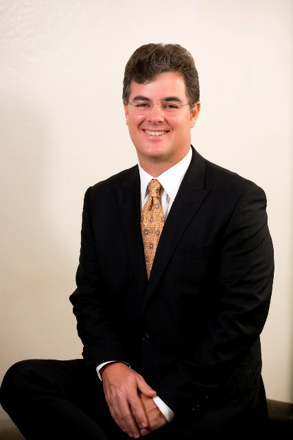 Empresario dominicano que actualmente cursa su segundo período como Presidente del Consejo Nacional de la Empresa Privada (CONEP) organización cúpula del empresariado de República Dominicana.